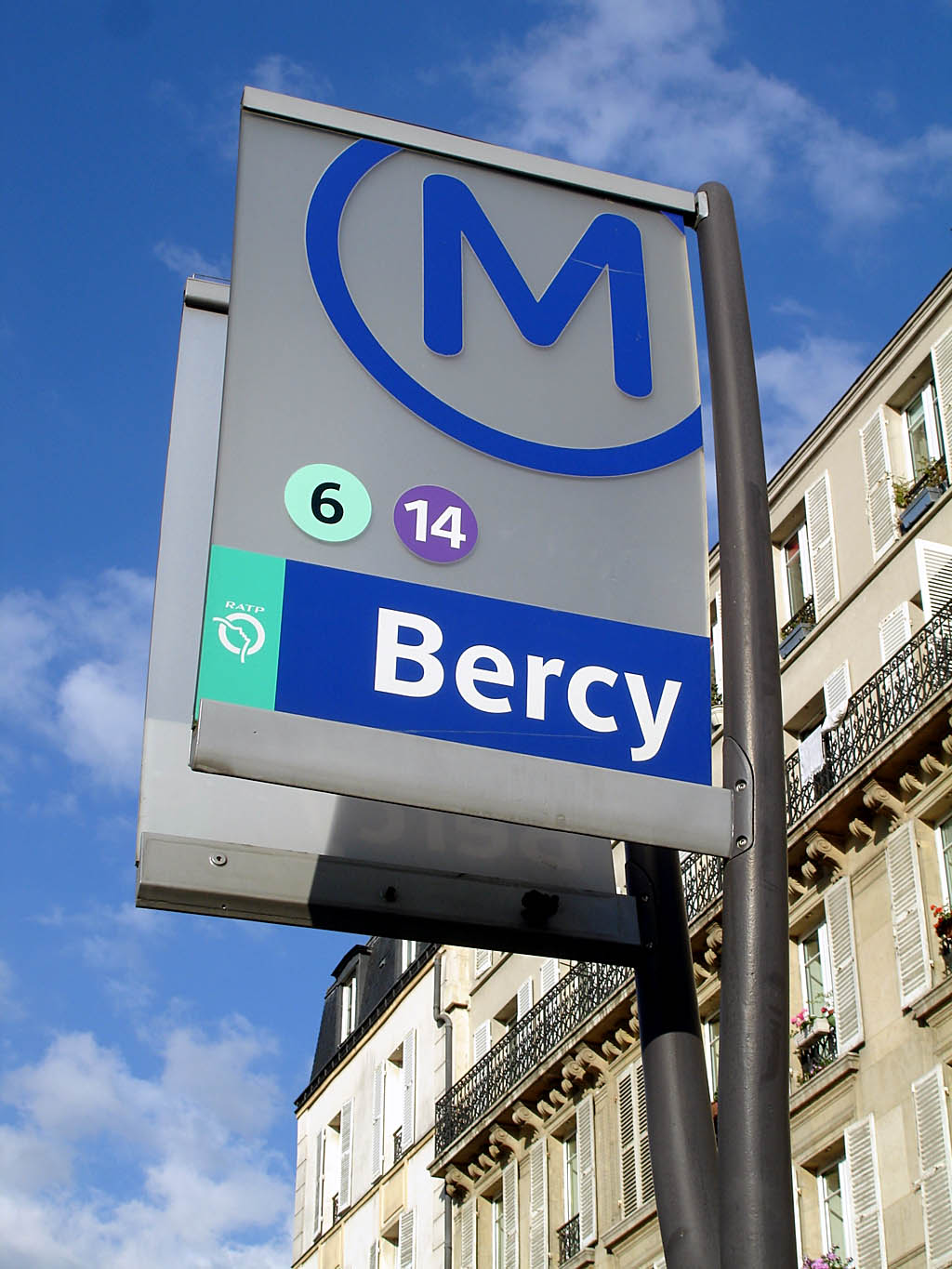 Totem de la station Bercy du métro de Paris, France.